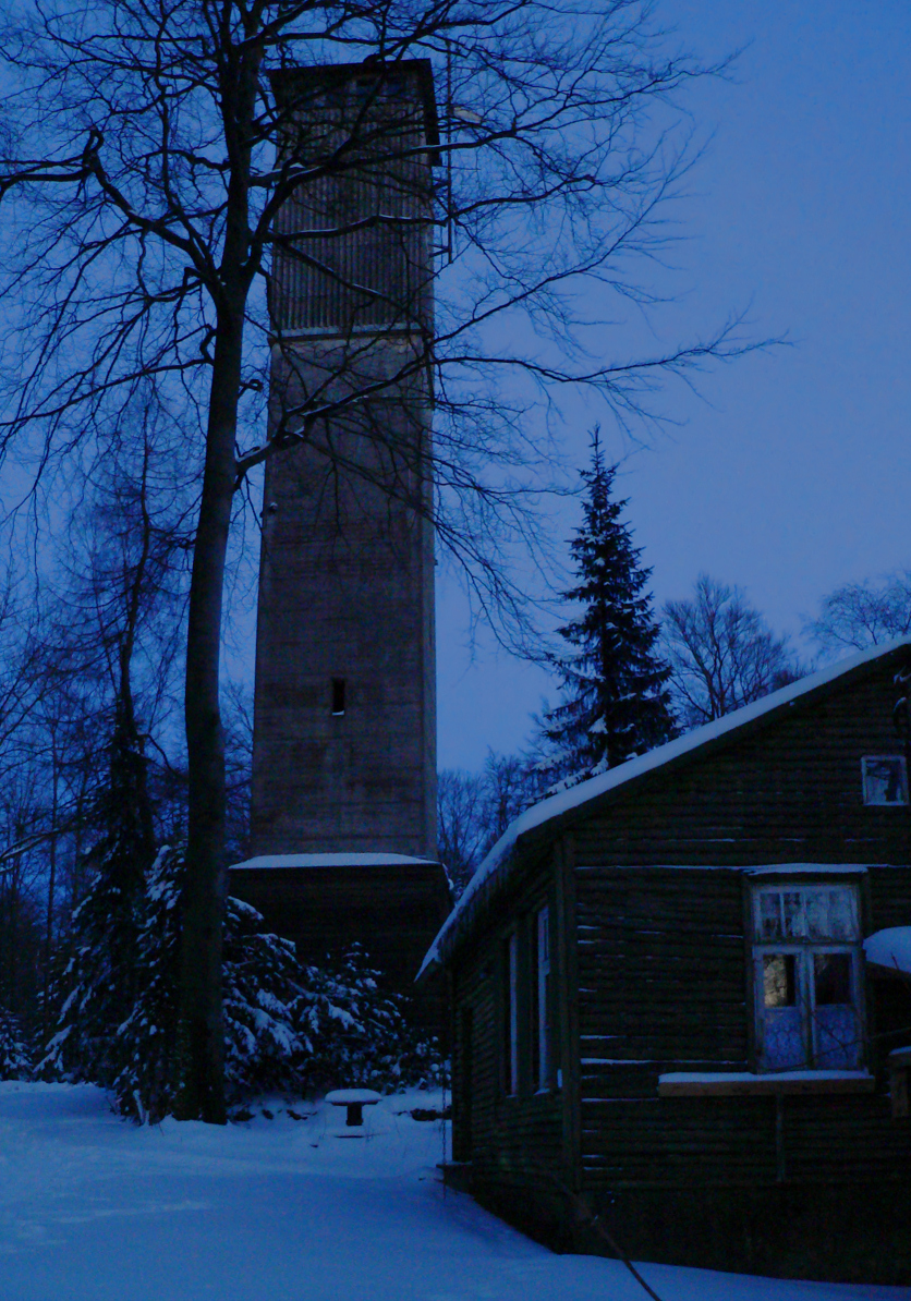 Iberger Albertturm